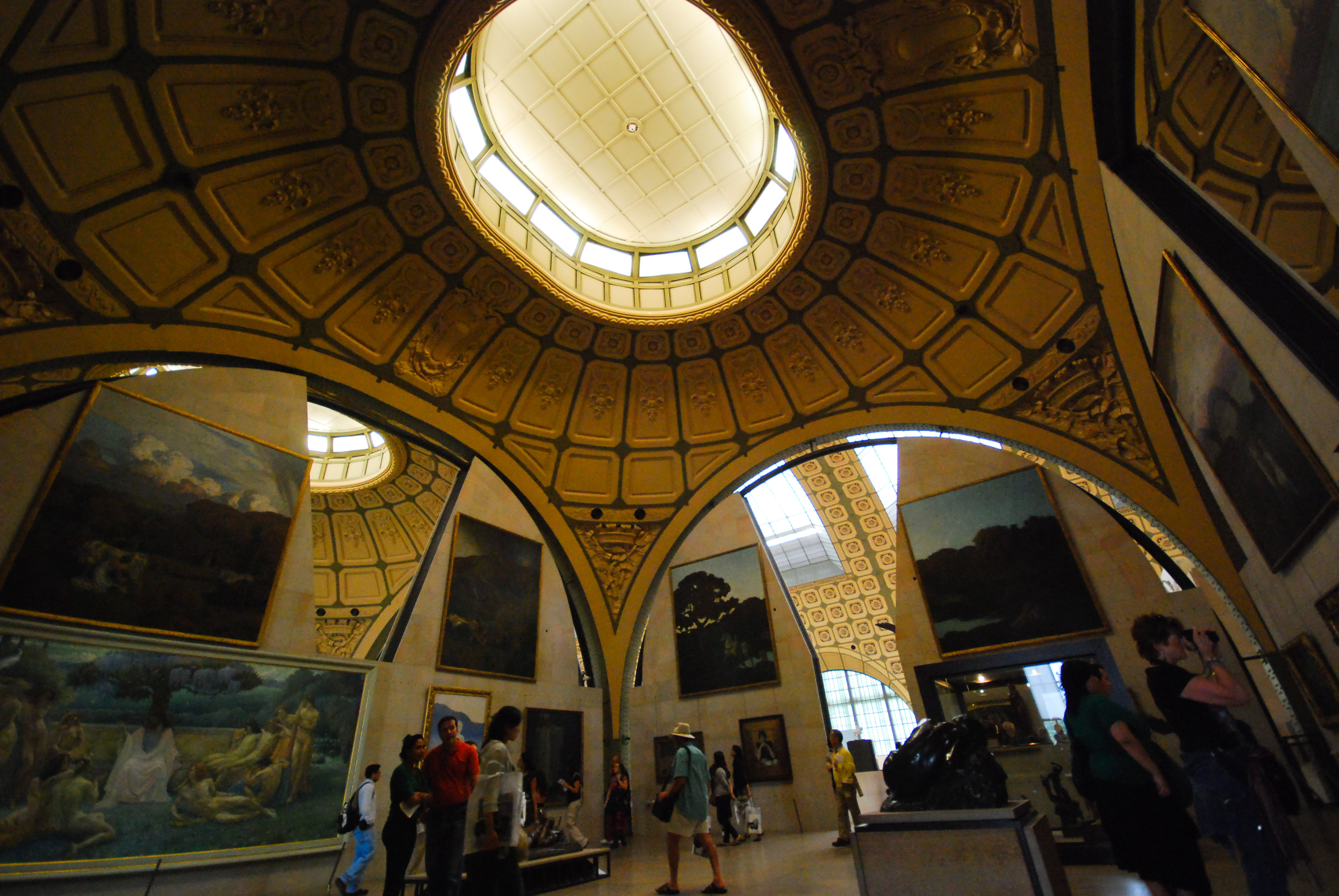 Musée Orsay